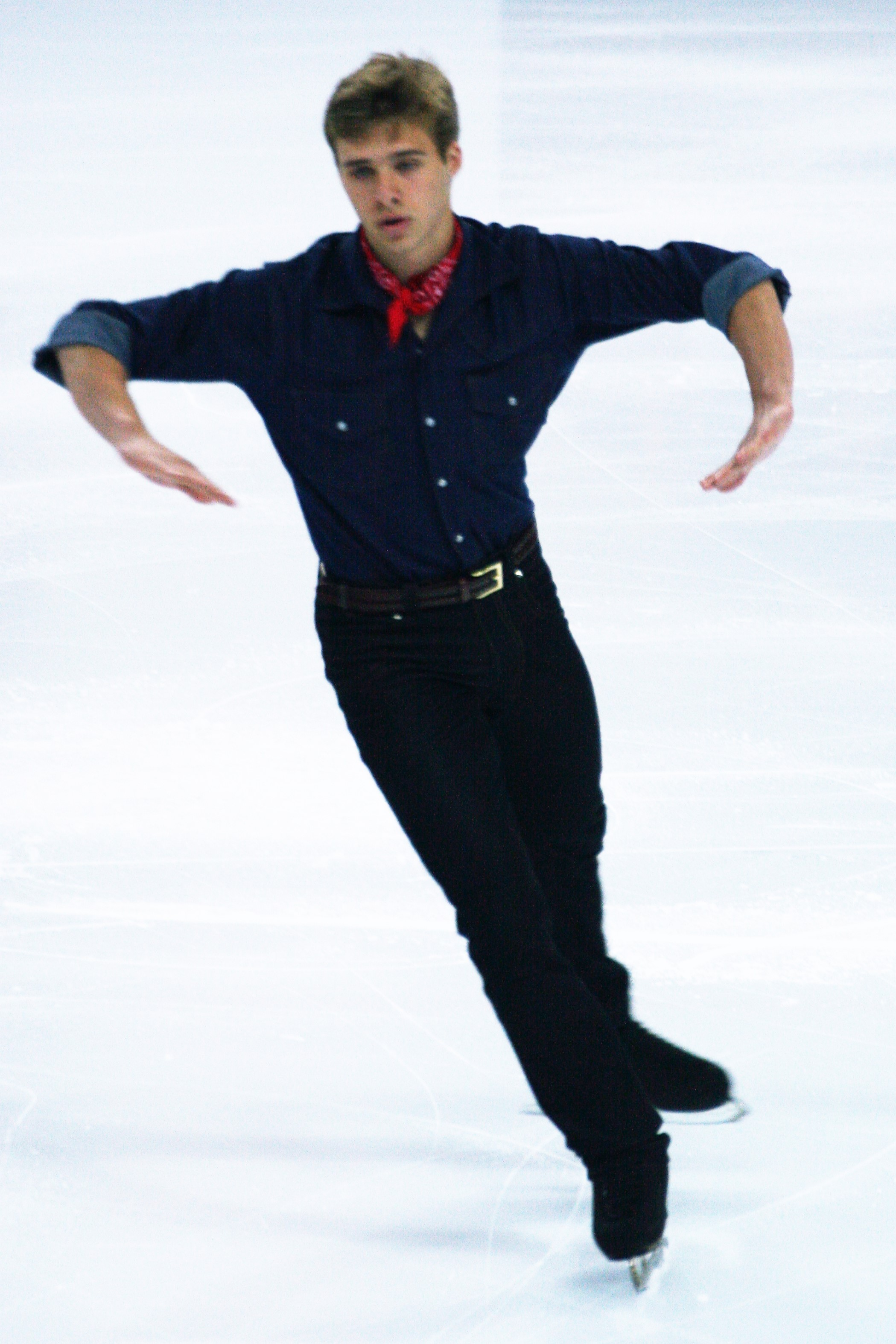 Алексей Красножон (США) на финале Гран-при по фигурному катанию среди юниоров 2016-2017